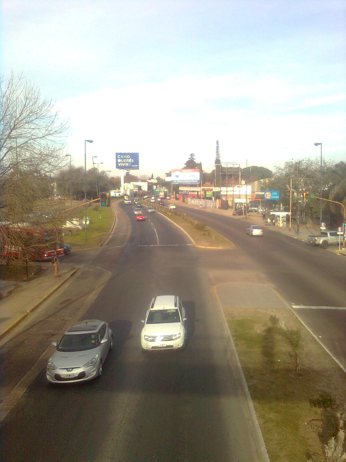 Camino Centenario y 501, sentido a La Plata